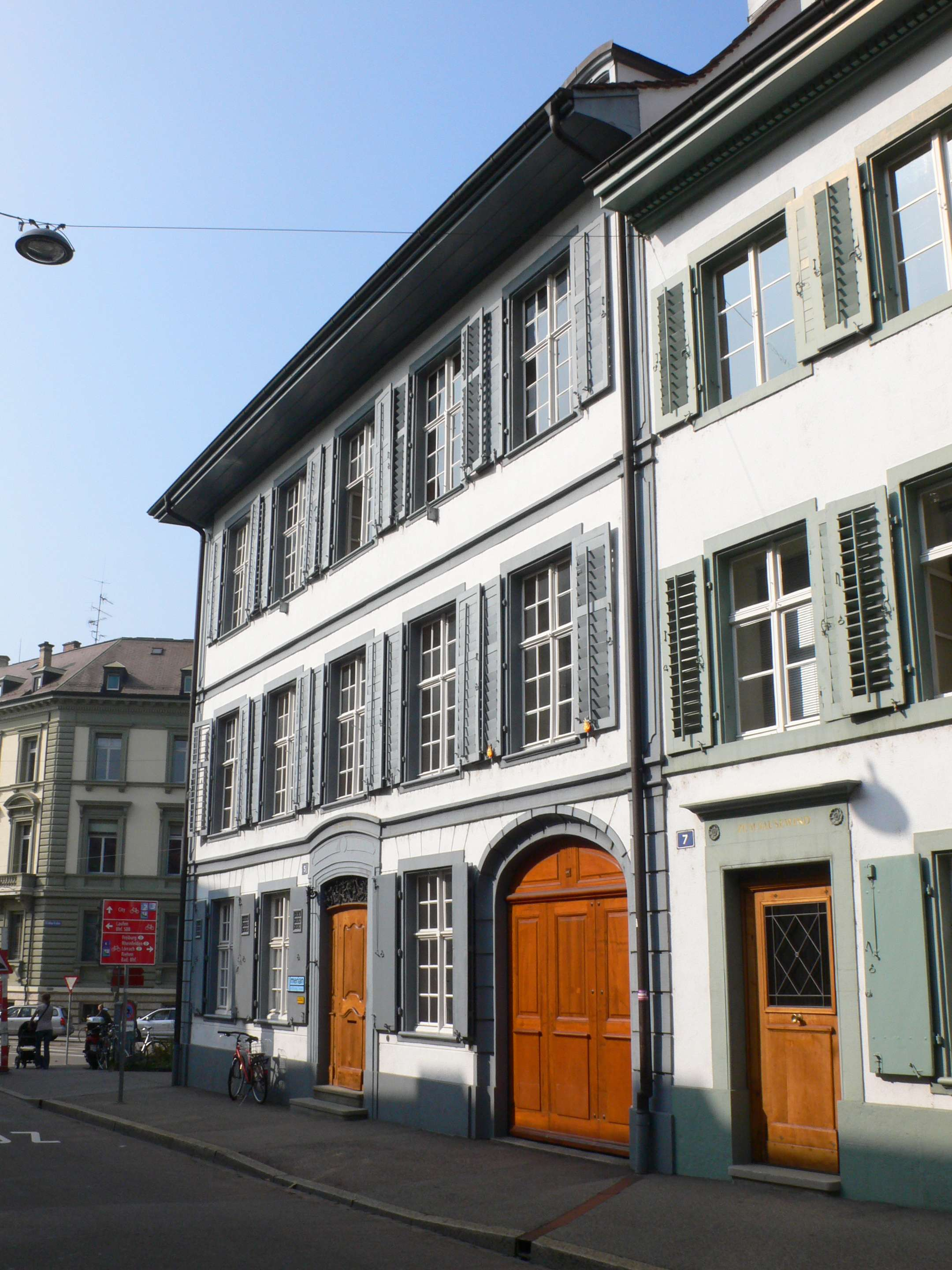 Verwaltungsgebäude der Christoph Merian Stiftung in Basel, St. Alban-Vorstadt 5